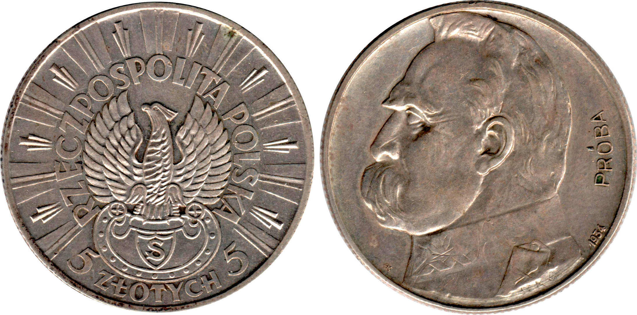 Próba 5 złotych 1934 Józef Piłsudski-orzeł strzelecki